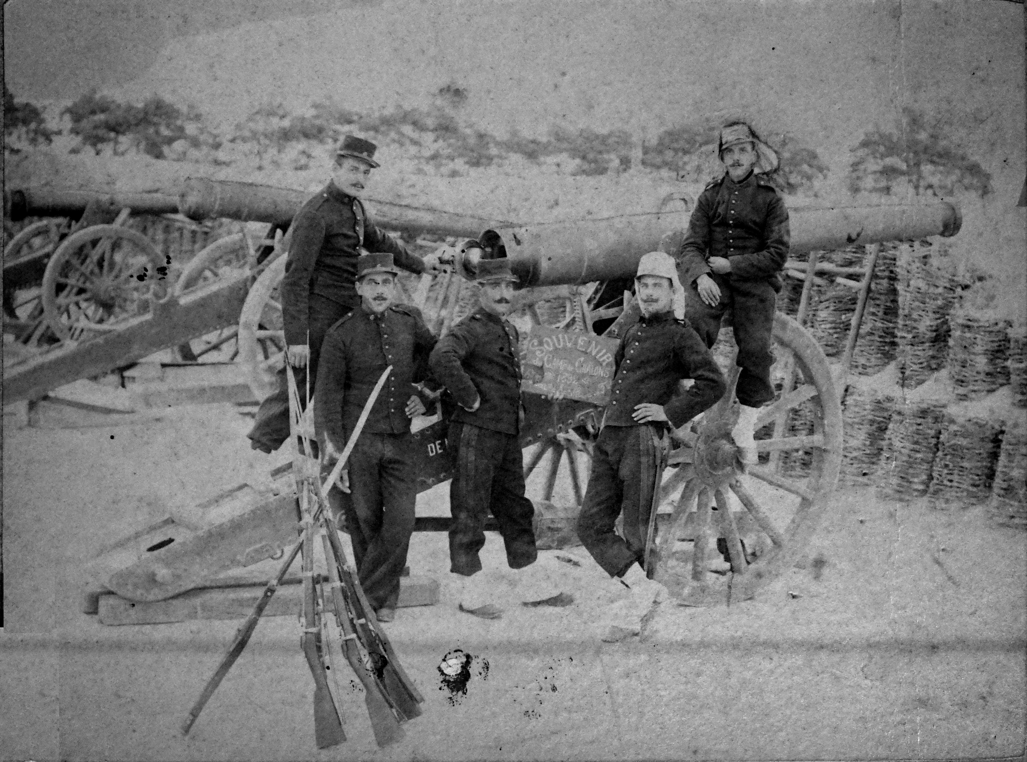 lors de l'exposition au musée de Toul.